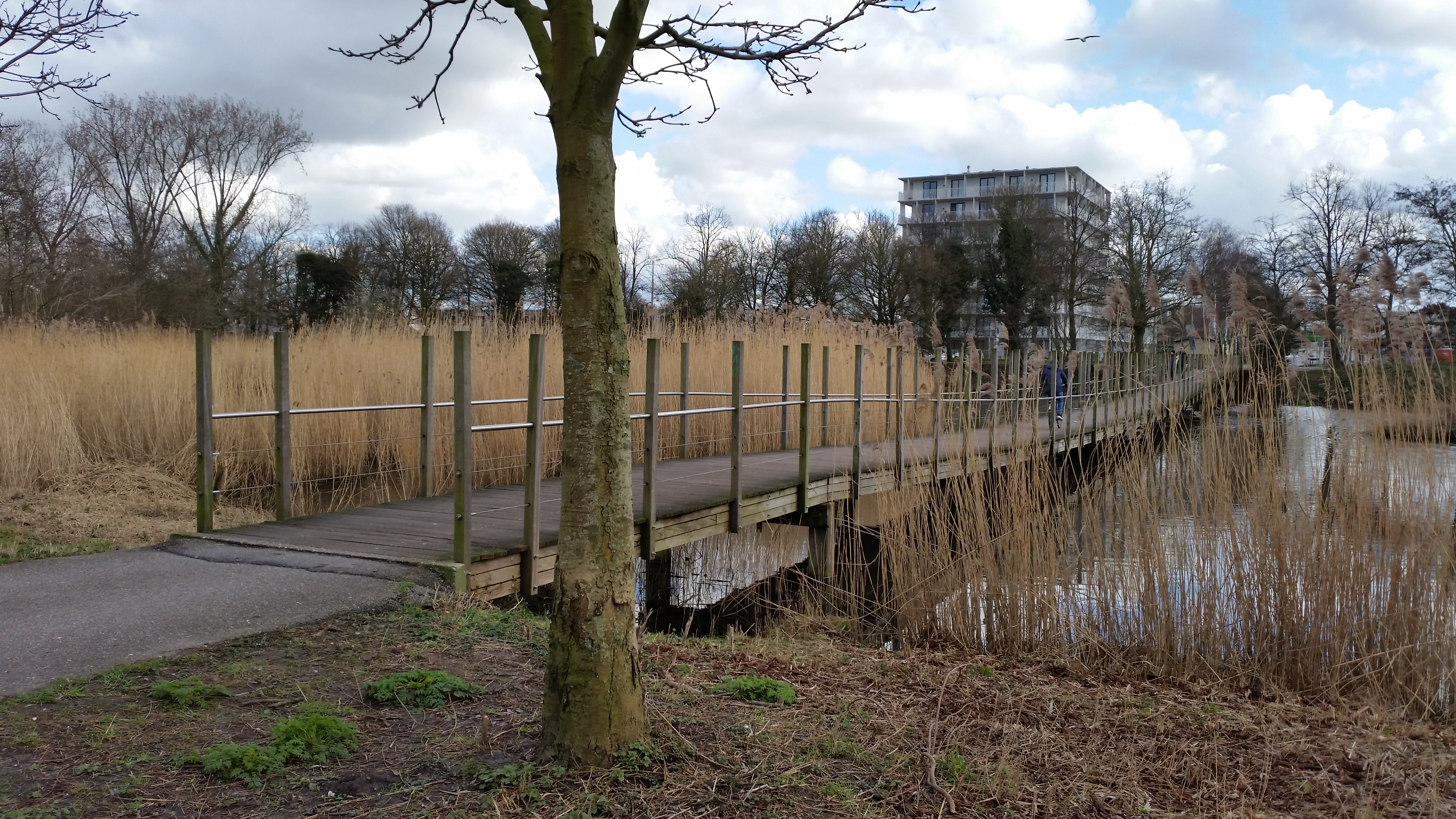 Impressie van de Mien Ruysbrug (brug 1944) in Watergraafsmeer (maart 2020)